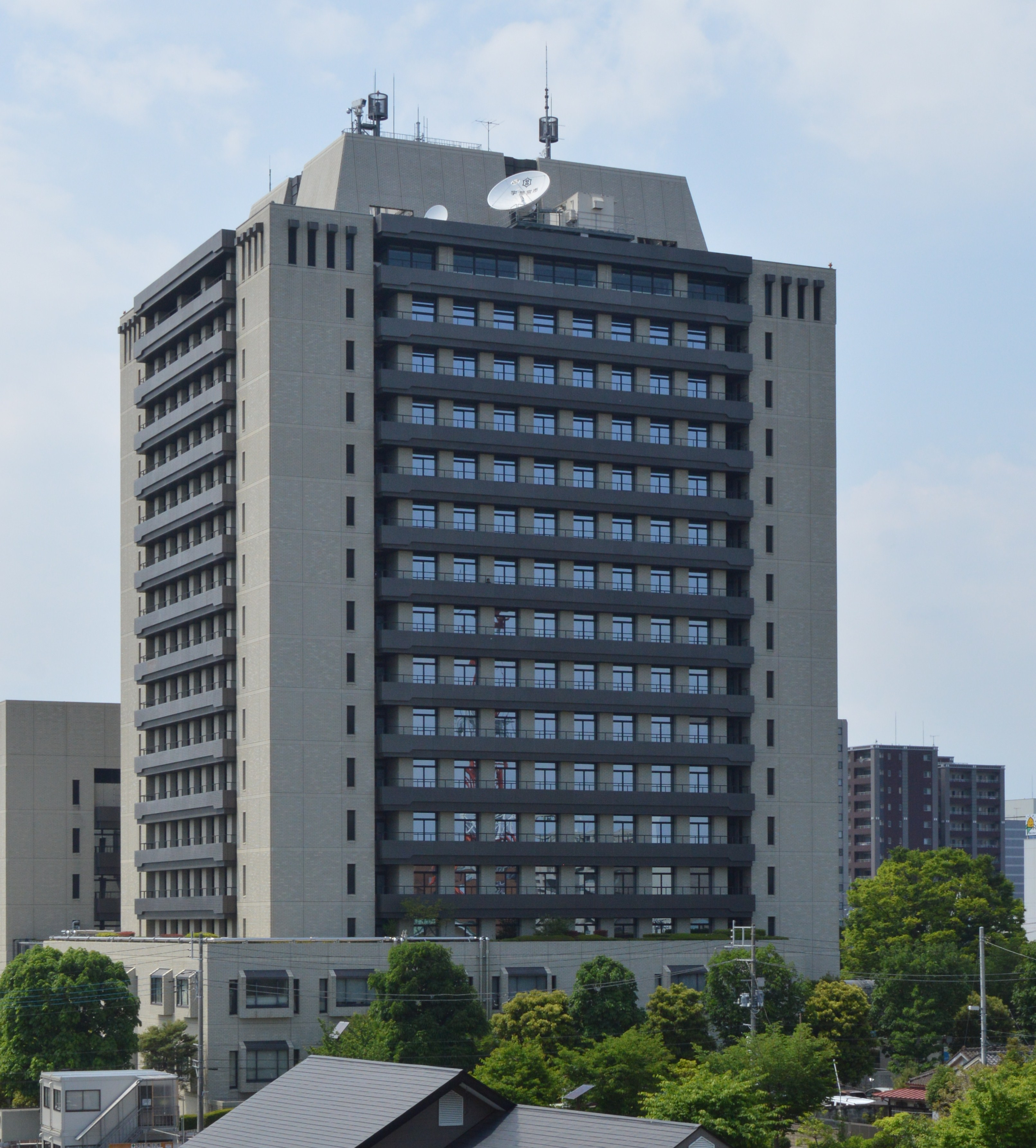 宇都宮市役所 西側にある宇都宮城址の櫓内から撮影